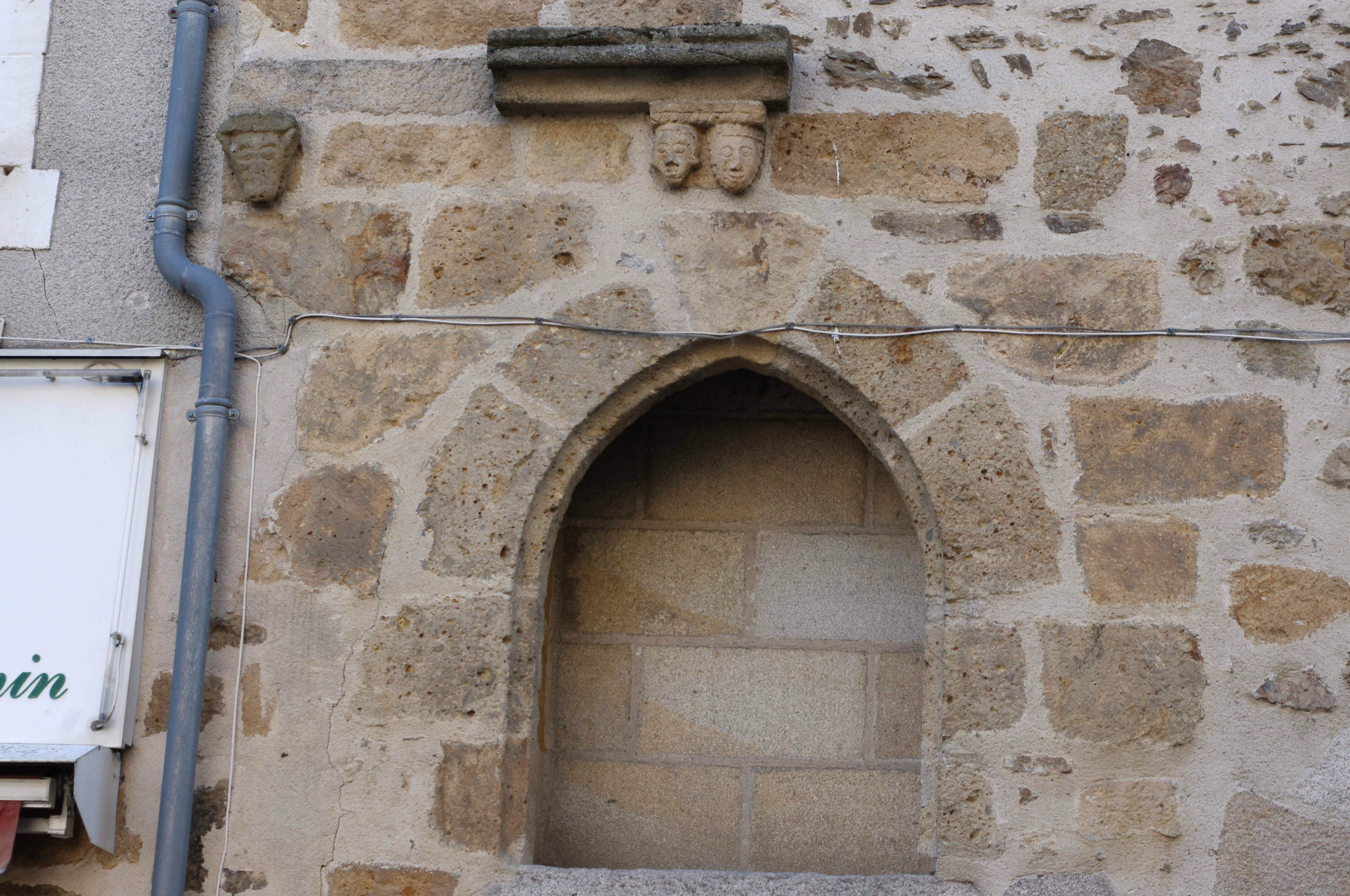 Rochechouart, rue Bertrand Bourdeau.